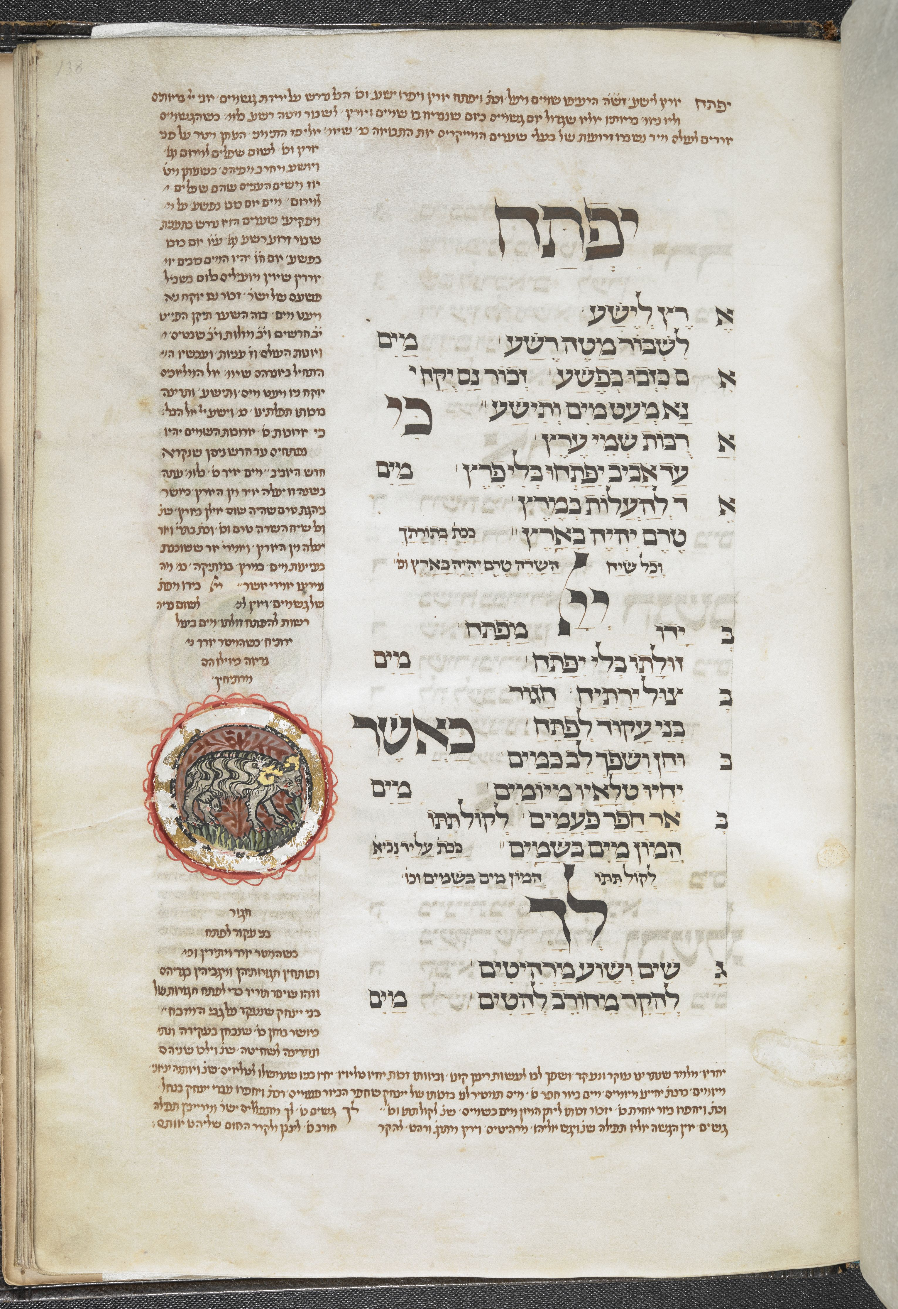 עמוד מתוך כת"י הספריה הבריטית Add. 22413, מחזור אשכנז לשבועות ולסוכות, המכיל את תחילת סדר הפסוקים 'יפתח ארץ לישע' מאת רבי אלעזר הקליר, מתוך תפילת גשם לשמיני עצרת. בצד הפיוט ישנו פירוש ועיטור של מזל טלה, המסמל את חודש ניסן.